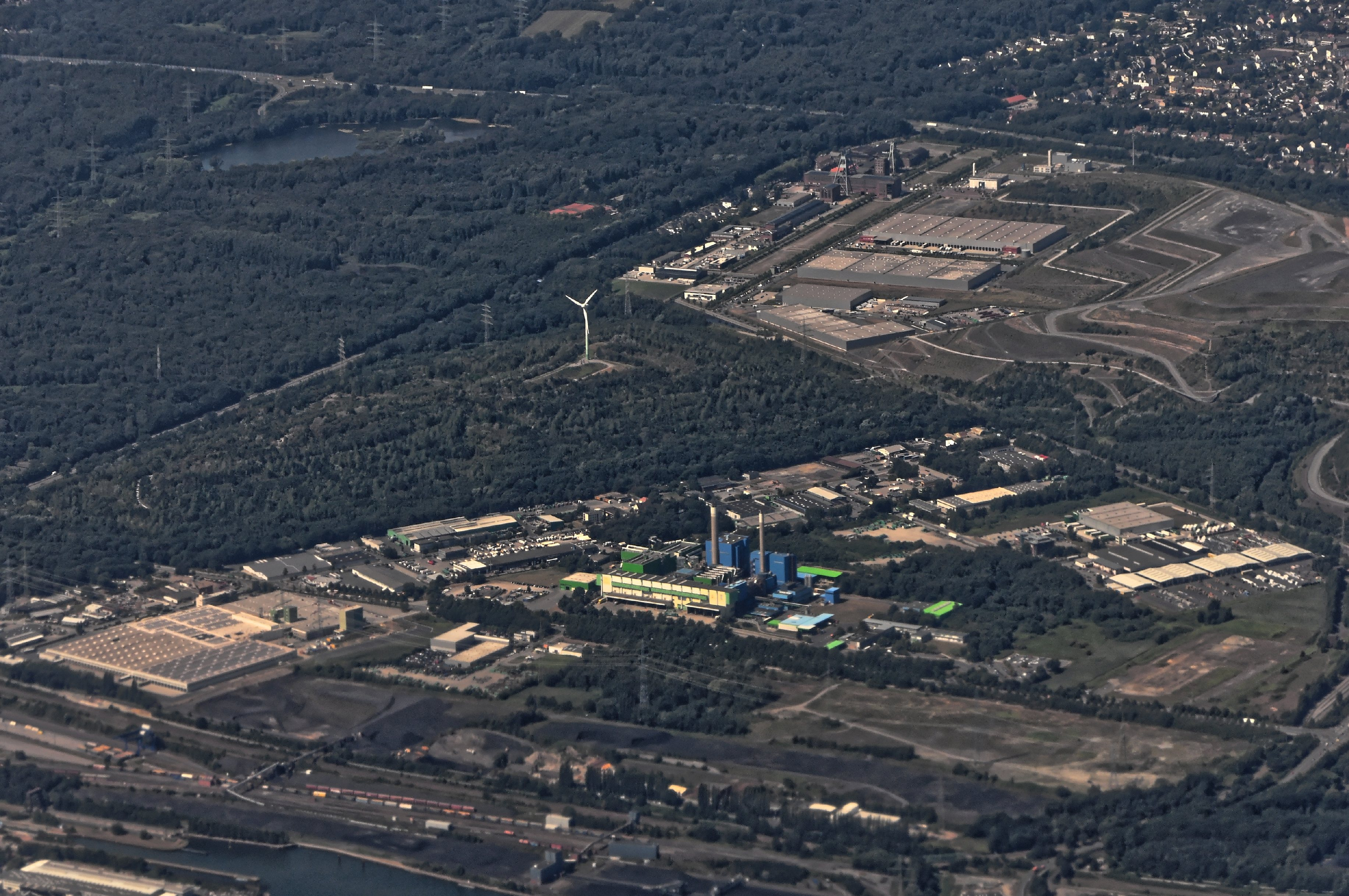 Bilder vom Flug -Rom-Düsseldorf-Hamburg 2013 Dieses Foto entstand in Zusammenarbeit mit Stadtbesichtigungen.de Die Seiten Stadtbesichtigungen.de, der dazugehörige Reise Blog sowie die Facebookseite: Stadtbesichtigungen Rom dürfen dieses Bild für Ihre Veröffentlichungen ohne den Hinweis auf Wikipedia, Commons bzw der Lizenz verwenden. Die Verantwortlichen habe von mir (Ra Boe) die Originaldaten zur freien Verfügung übermittelt bekommen.